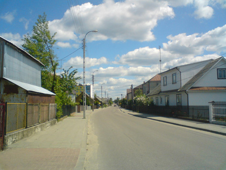 Ulica Lipowa. Początkowy fragment od ulicy 3-go Maja.